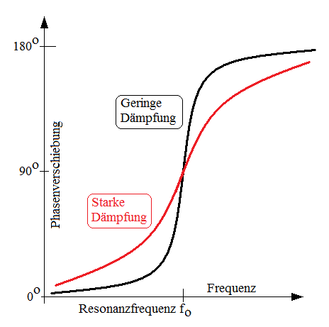 Phasenverschiebung schwache und starke Dämpfung, Schwingkreis